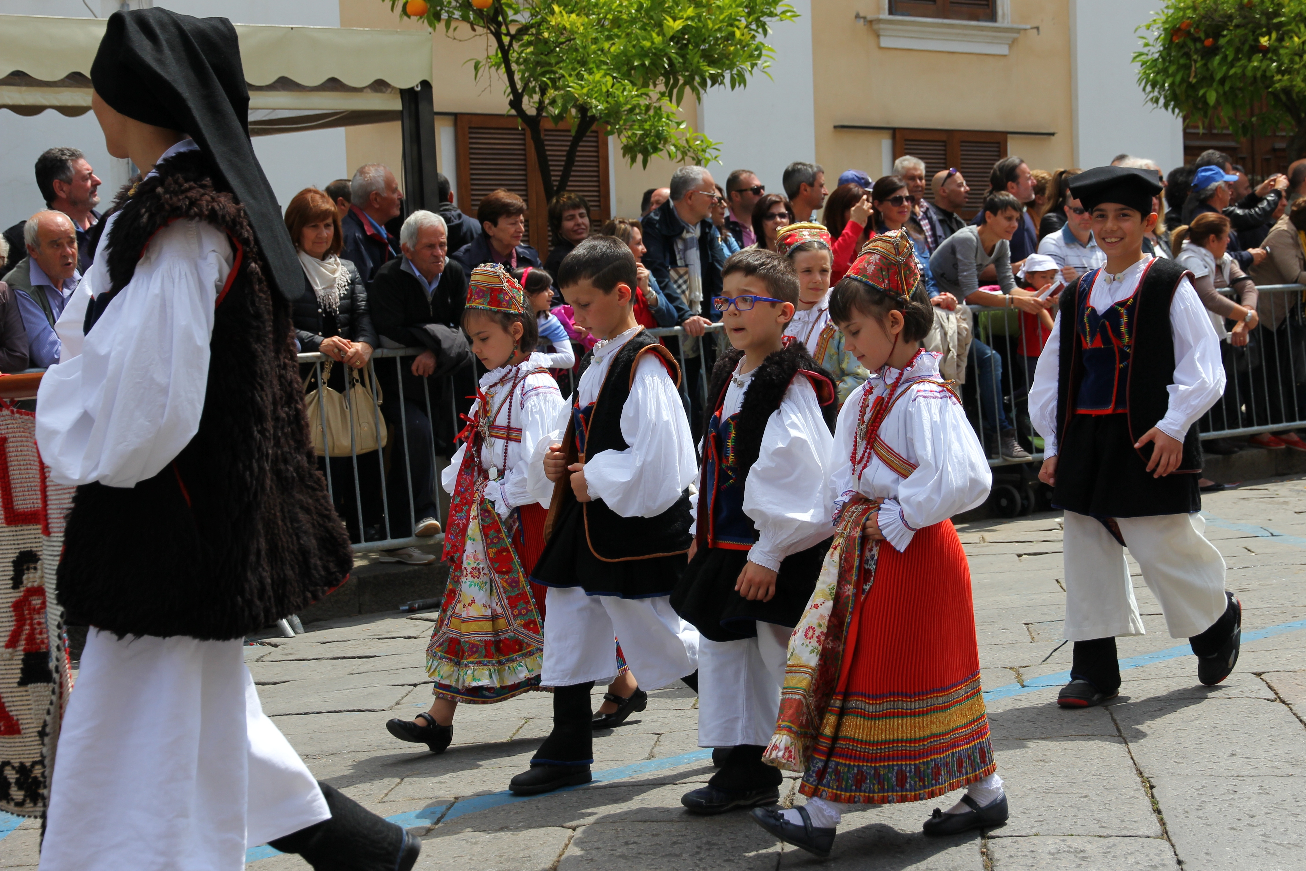 Costume tradizionale